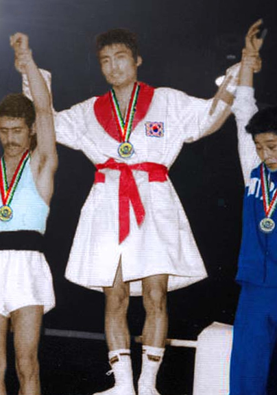 Boxing 48 kg podium, 1974 Asian Games in Tehran. L-r: Abdolreza Ansari, Park Chan-hee, Noboru Uchiyama